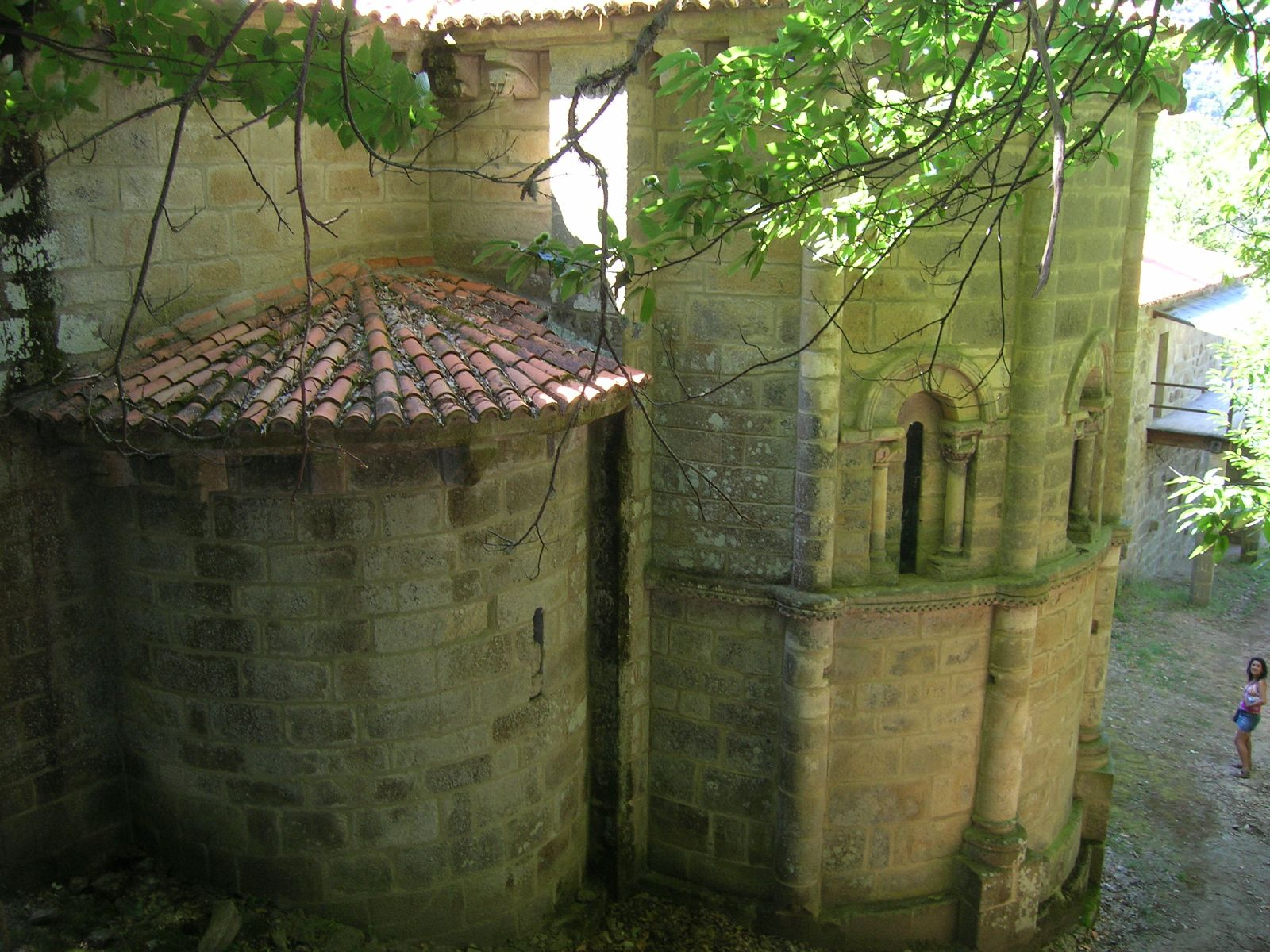 Cabecera románica de la iglesia del Monasterio de Santa Cristina de Ribas de Sil - Parada de Sil - Ourense